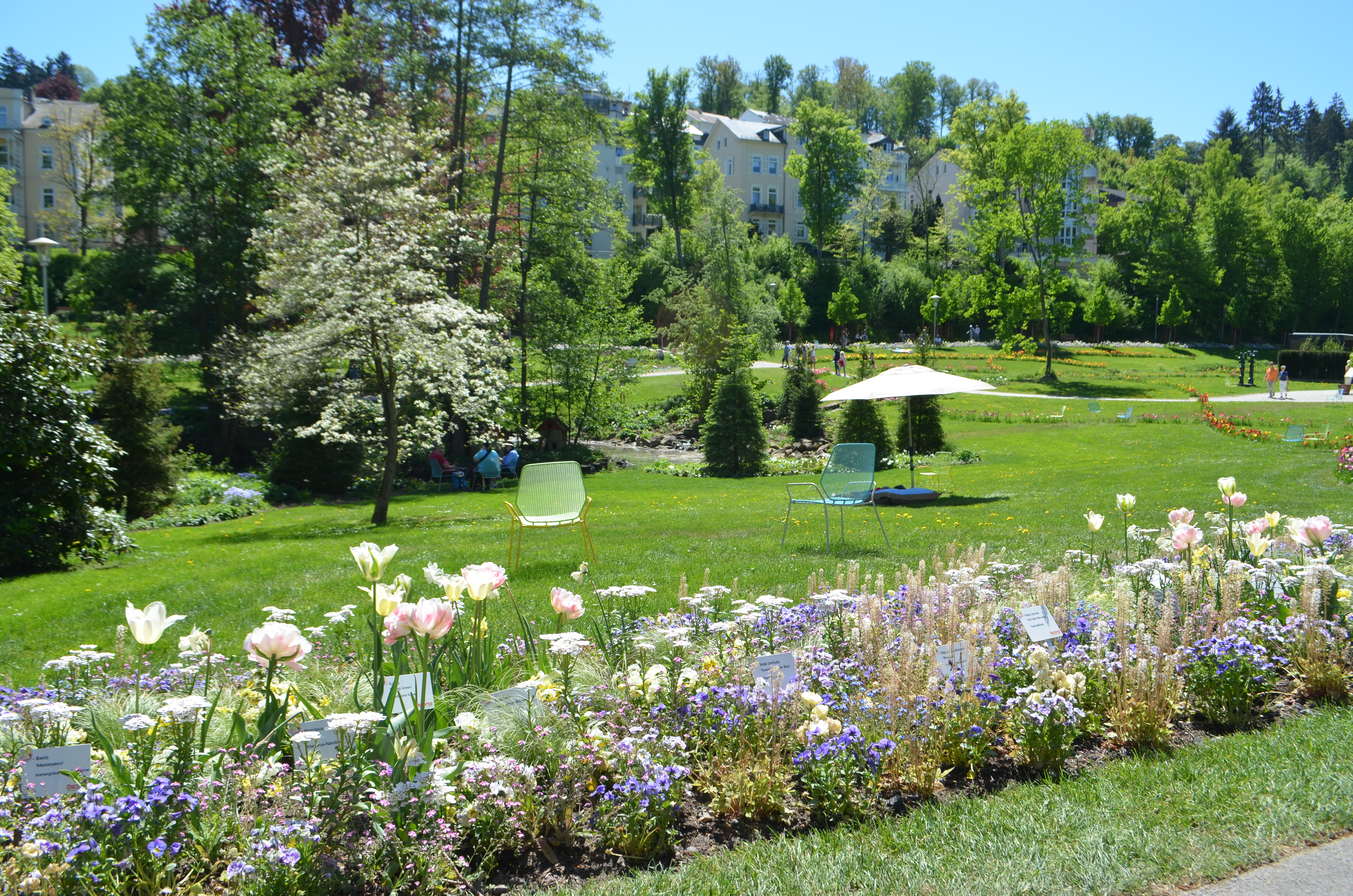 Bad Schwalbach, Landesgartenschau 2018, Logo